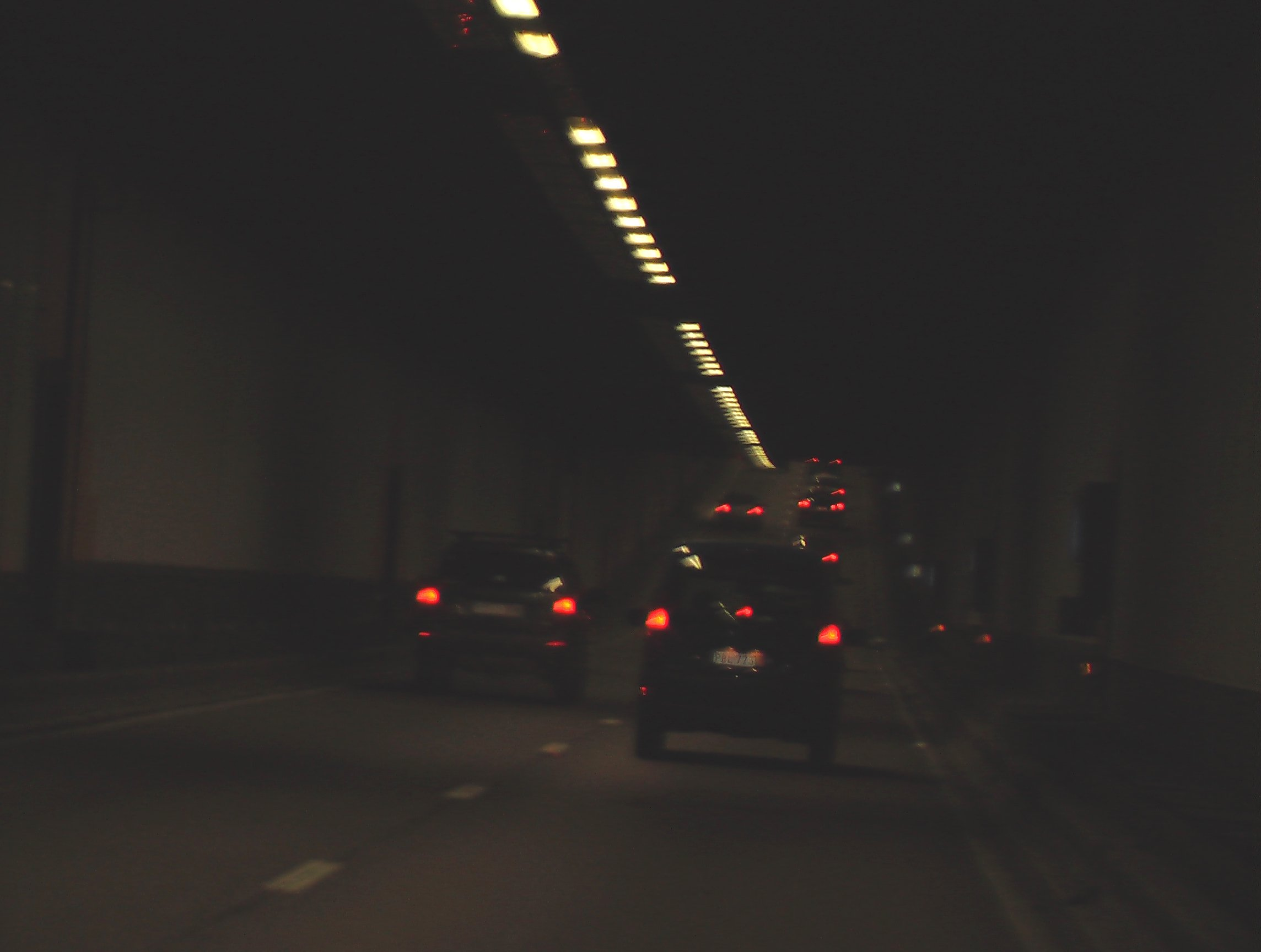 Leopold II-tunnel